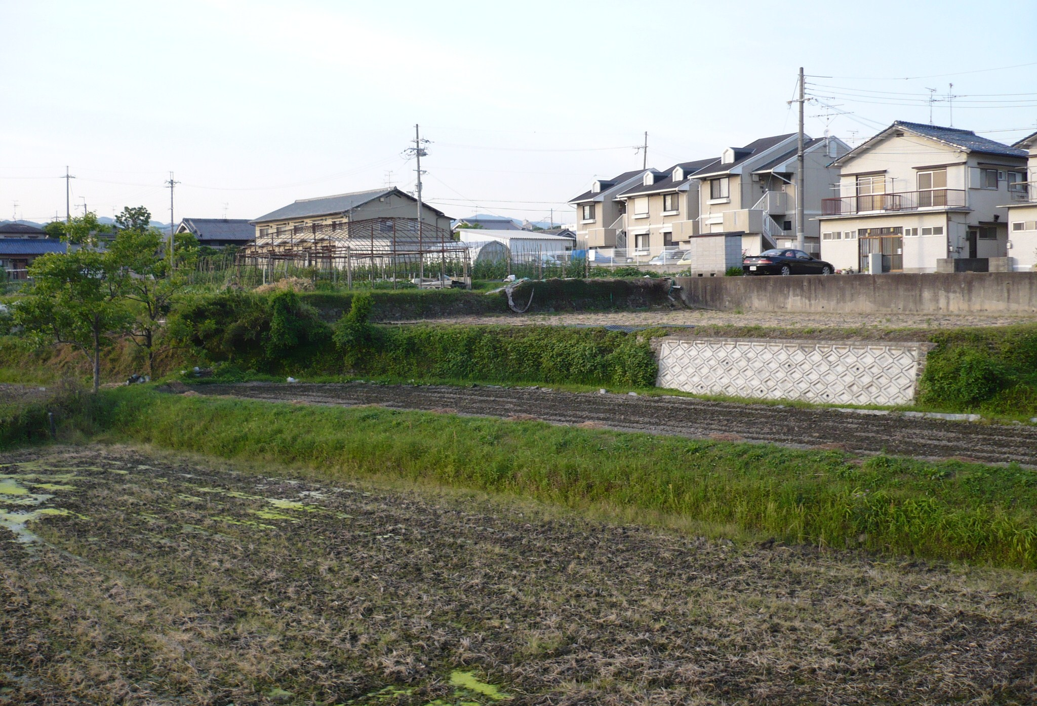 太田城の西側